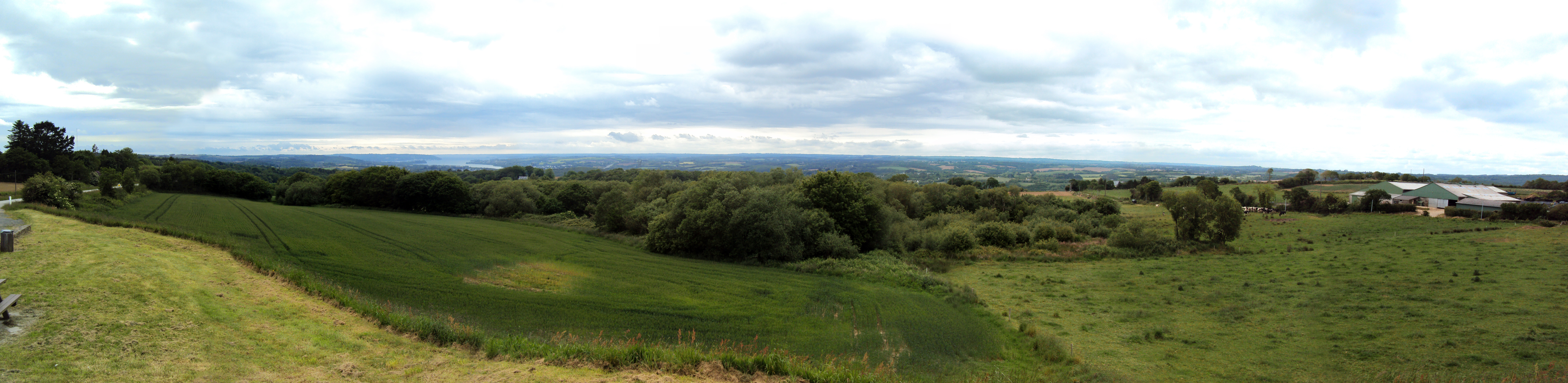 Au fond, en direction du nord-ouest, les méandres de l'Aulne